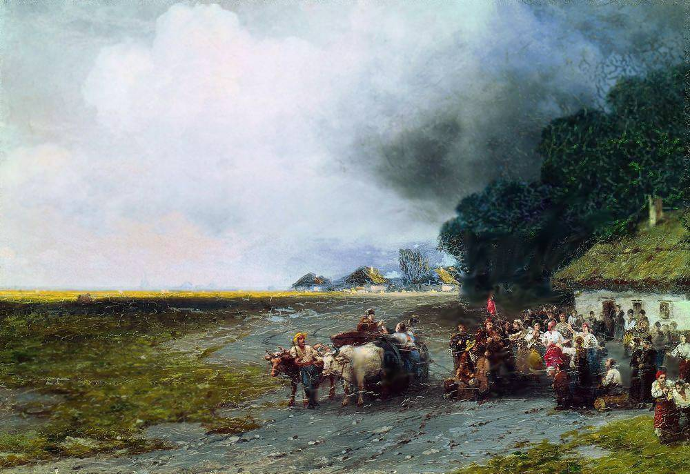 Весілля в Україні: И. К. Айвазовский Свадьба на Украине 1892, холст, масло,53 x 80 см Феодосийская картинная галерея им. И.К.Айвазовского